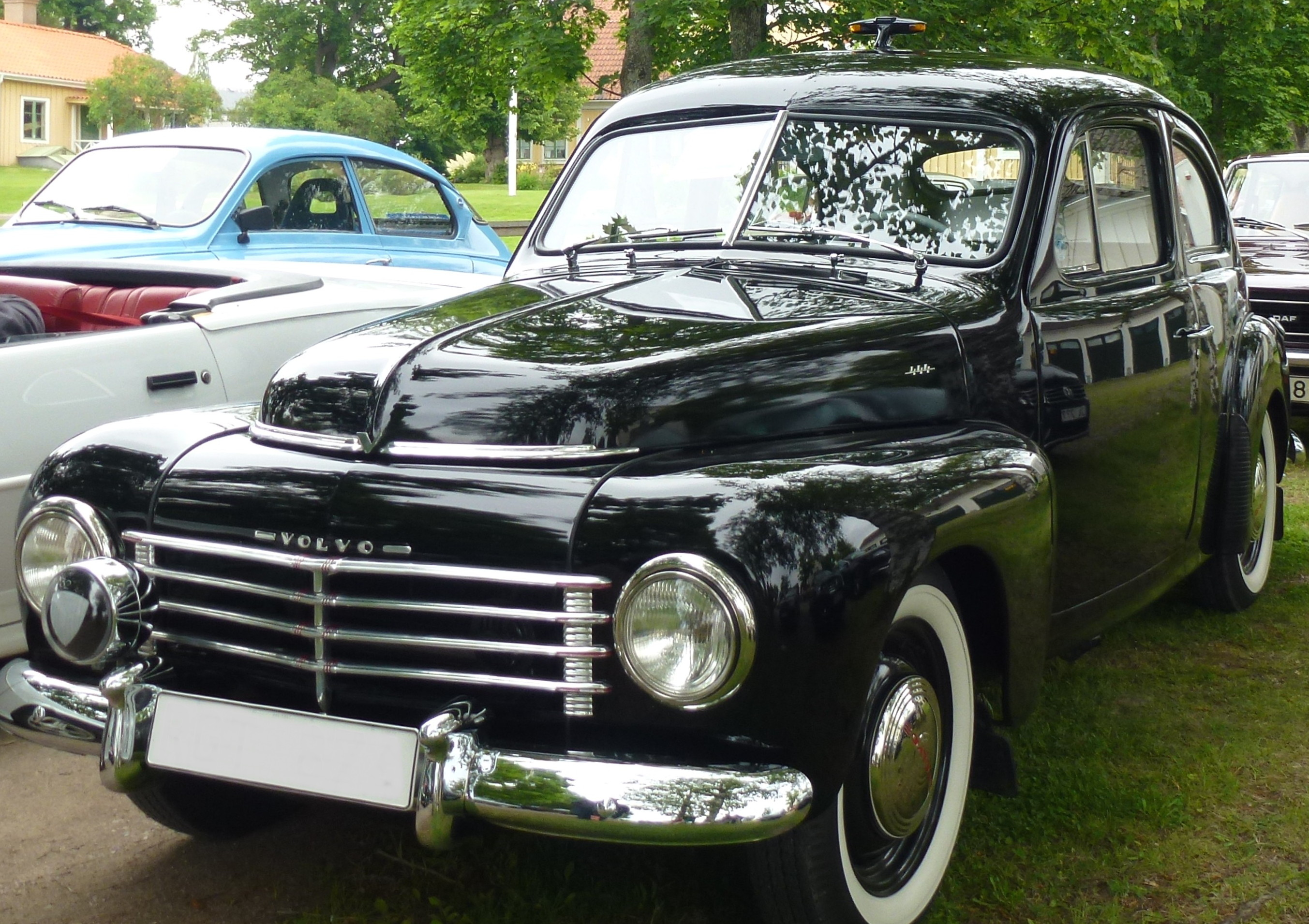 Volvo PV 444 "takgök"